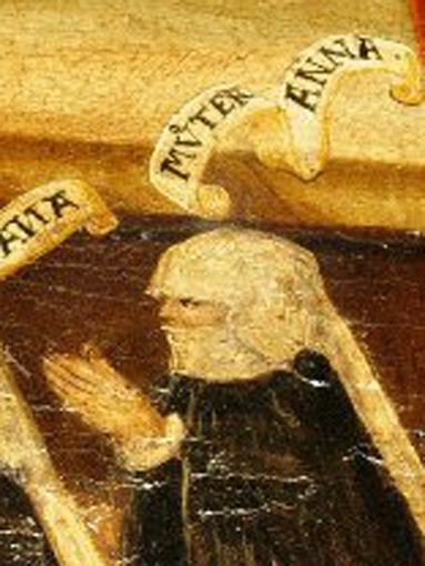 Anna Murschel: Detail aus dem Epitaph ihres Gatten Caspar Murschel, genannt Tübinger im Chor der Stadtkirche Balingen